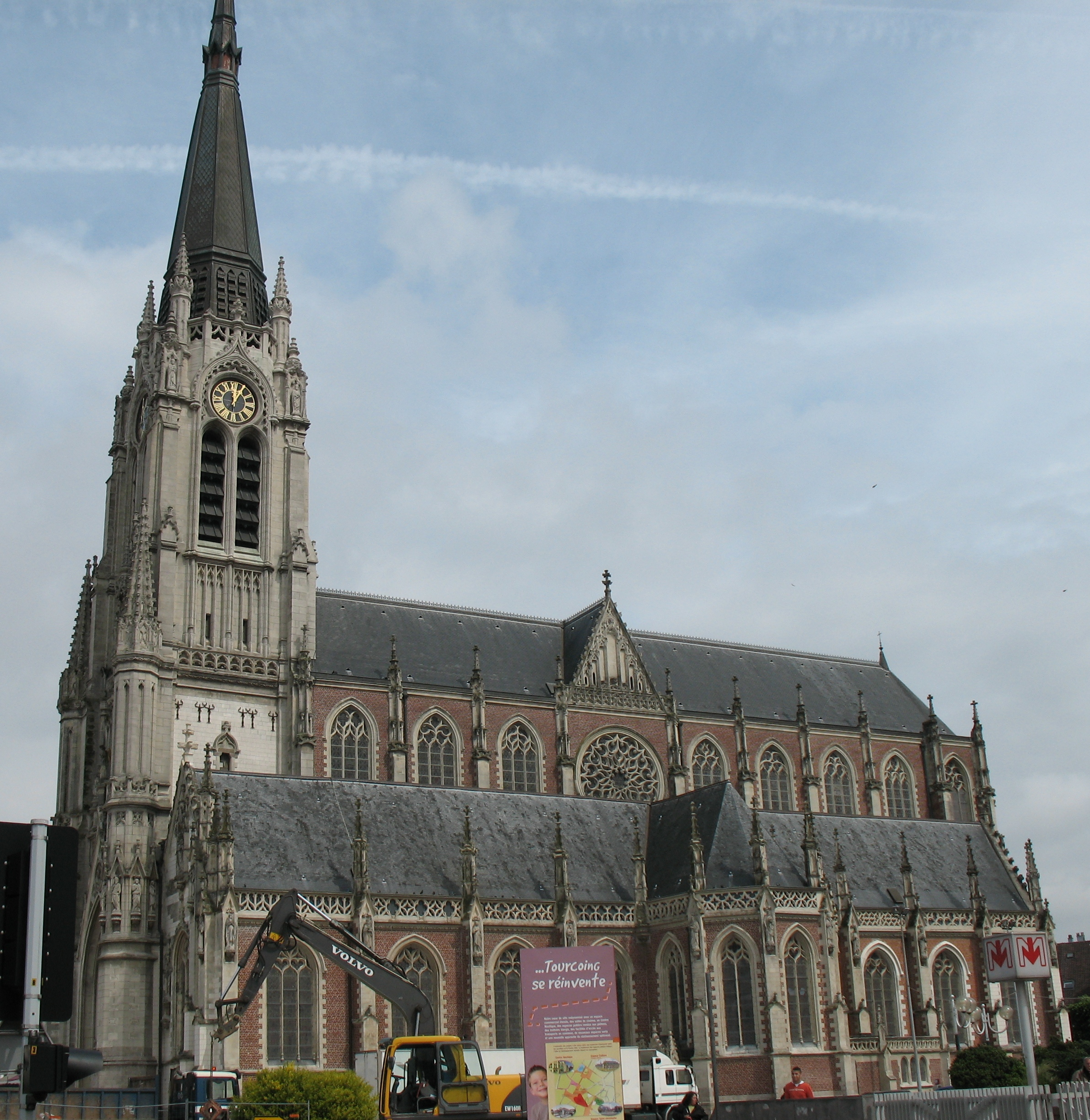 Église Saint-Christophe de Tourcoing